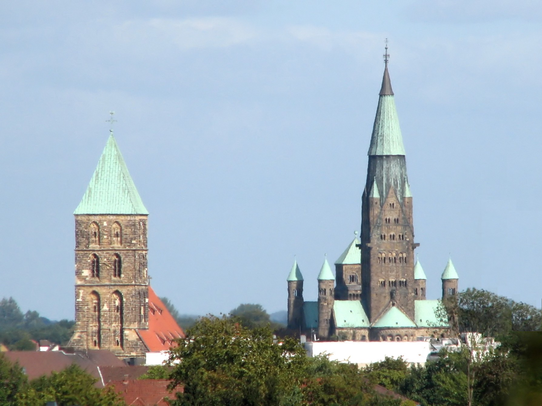 Blick auf Rheine. Links die Stadtkirche St. Dionysius, rechts die St.-Antonius-Basilika (mit einer Turmhöhe von 107 Metern die höchste Kirche des Münsterlandes). This image shows a heritage building in Germany, located in the North Rhine-Westphalian city Rheine (no. 033).